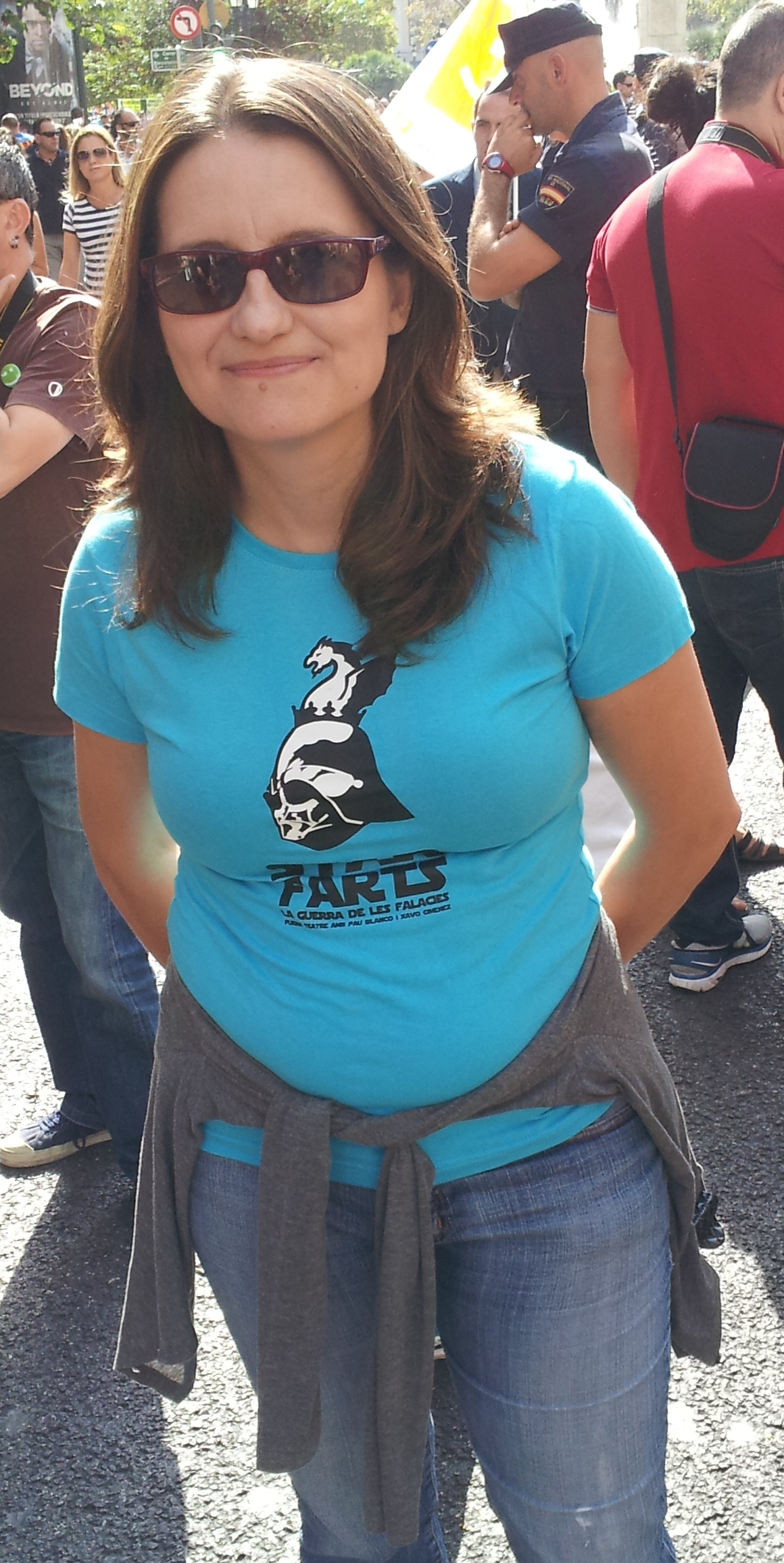 Mònica Oltra a la Processó cívica de 2013 .